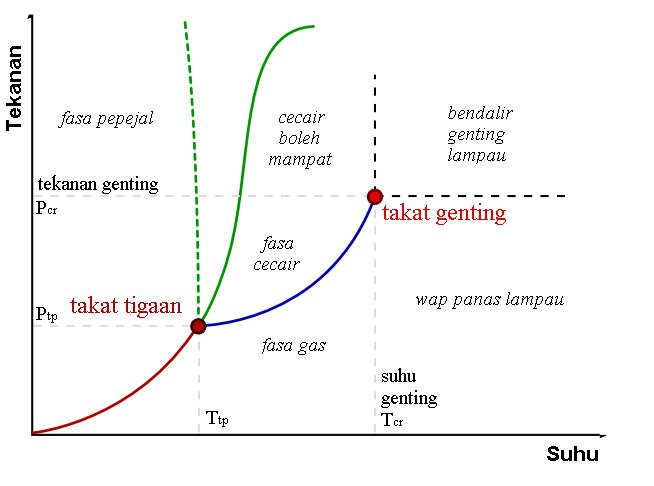 Gambar rajah fasa biasa. Garis bertitik memberikan ciri anomali bagi air. Garisan hijau menandakan takat beku dan garisan biru bagi takat didih, yang berubah melalui tekanan.